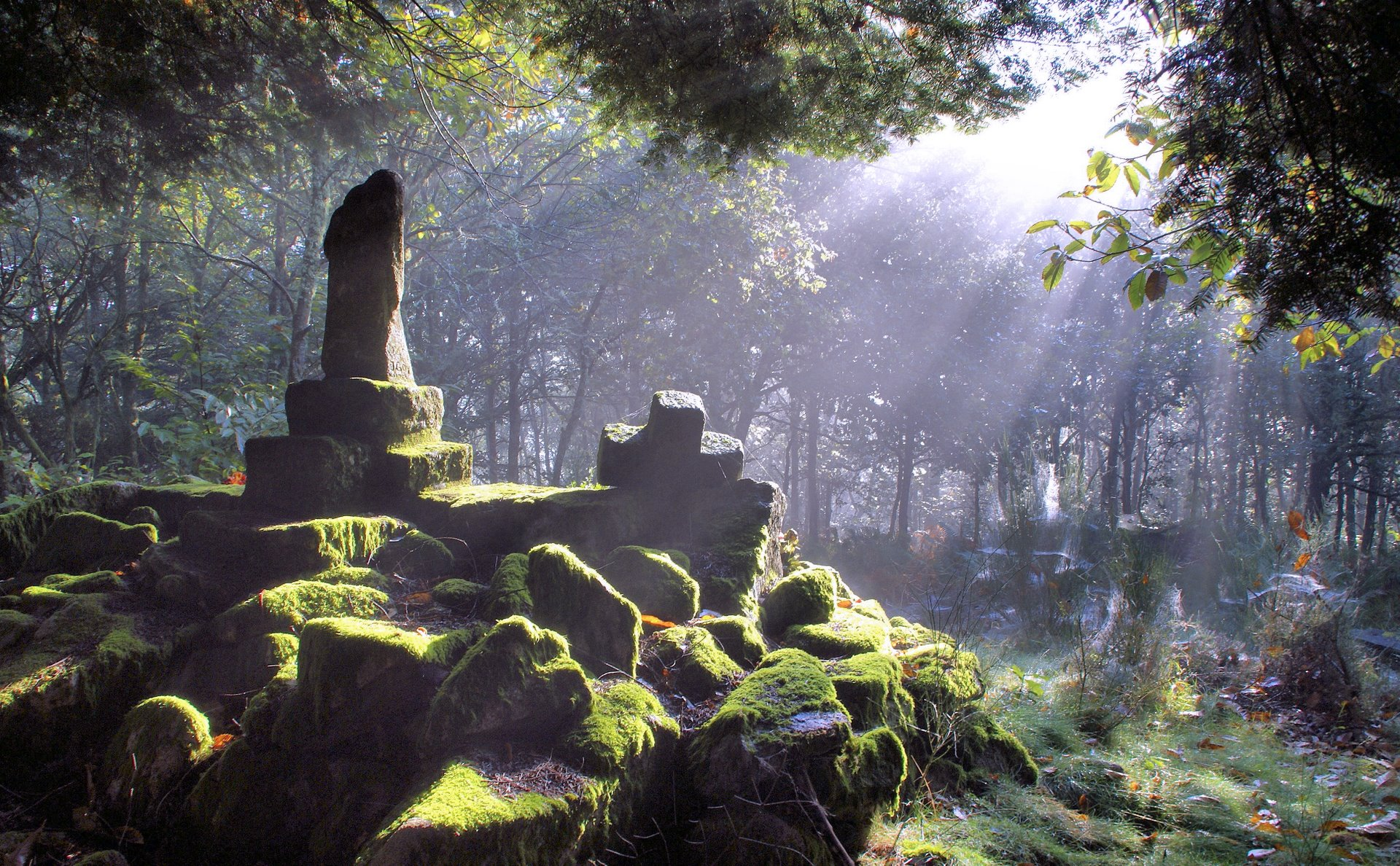 Autel de la Vierge situé au sommet du Puy de Jabreilles (Haute-Vienne)